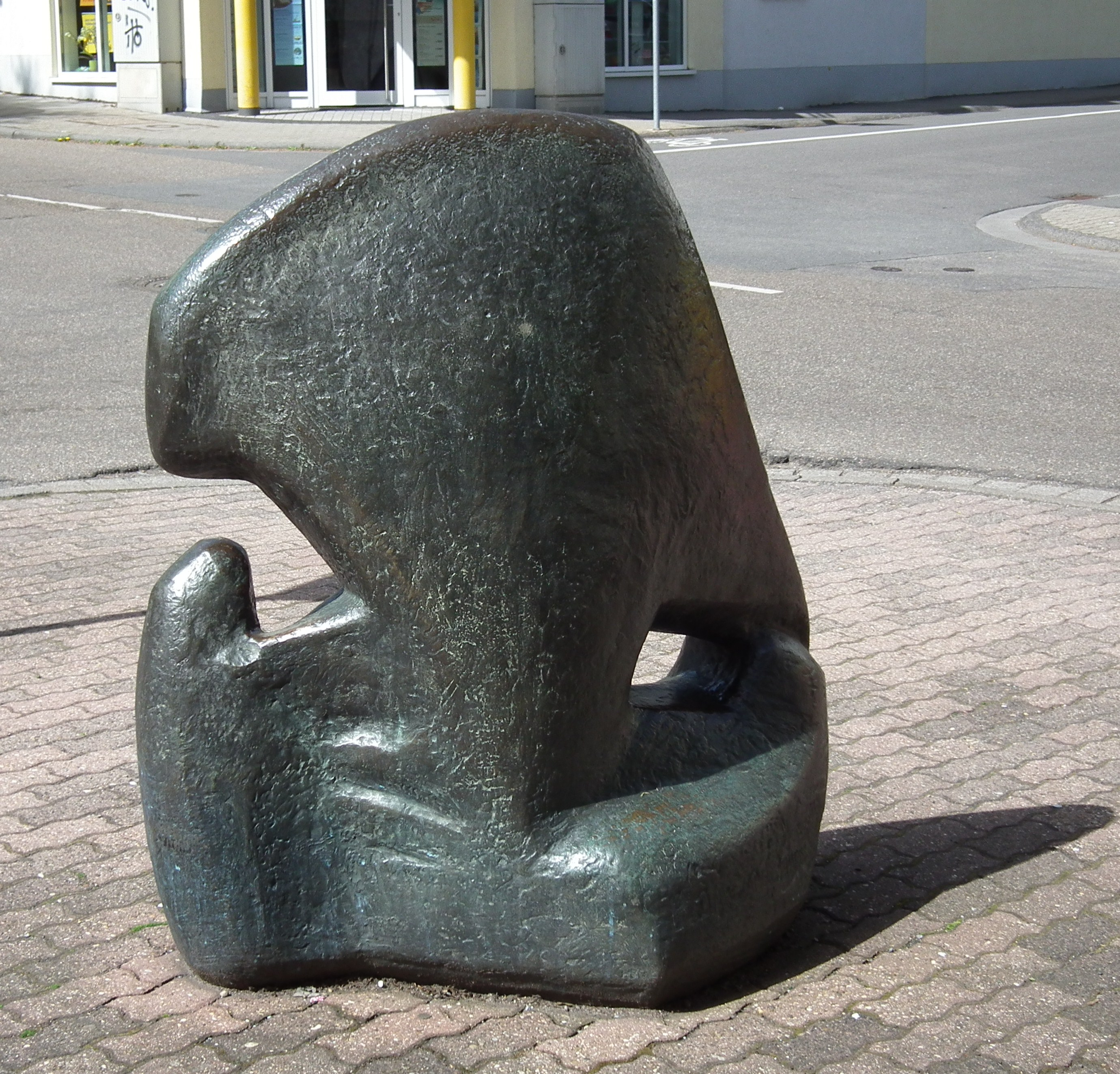 "Tiermutter mit Jungen" (1961) aus Bronze von László Szabó, fotografiert in der Innenstadt von Wiesloch (Baden-Württemberg, Deutschland)